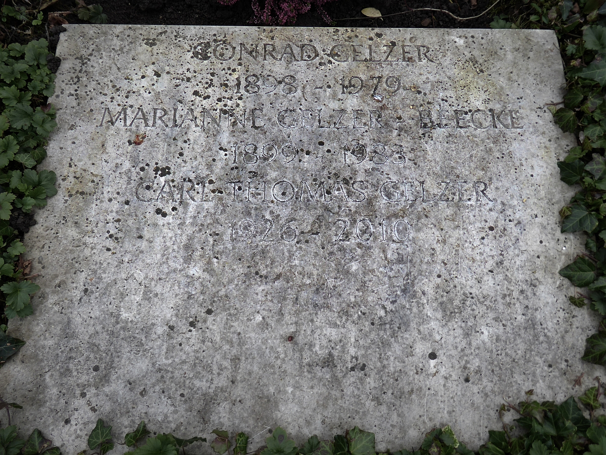 Karl Thomas Gelzer (1926–2010) Altphilologe, Grab auf dem Friedhof Wolfgottesacker, Basel